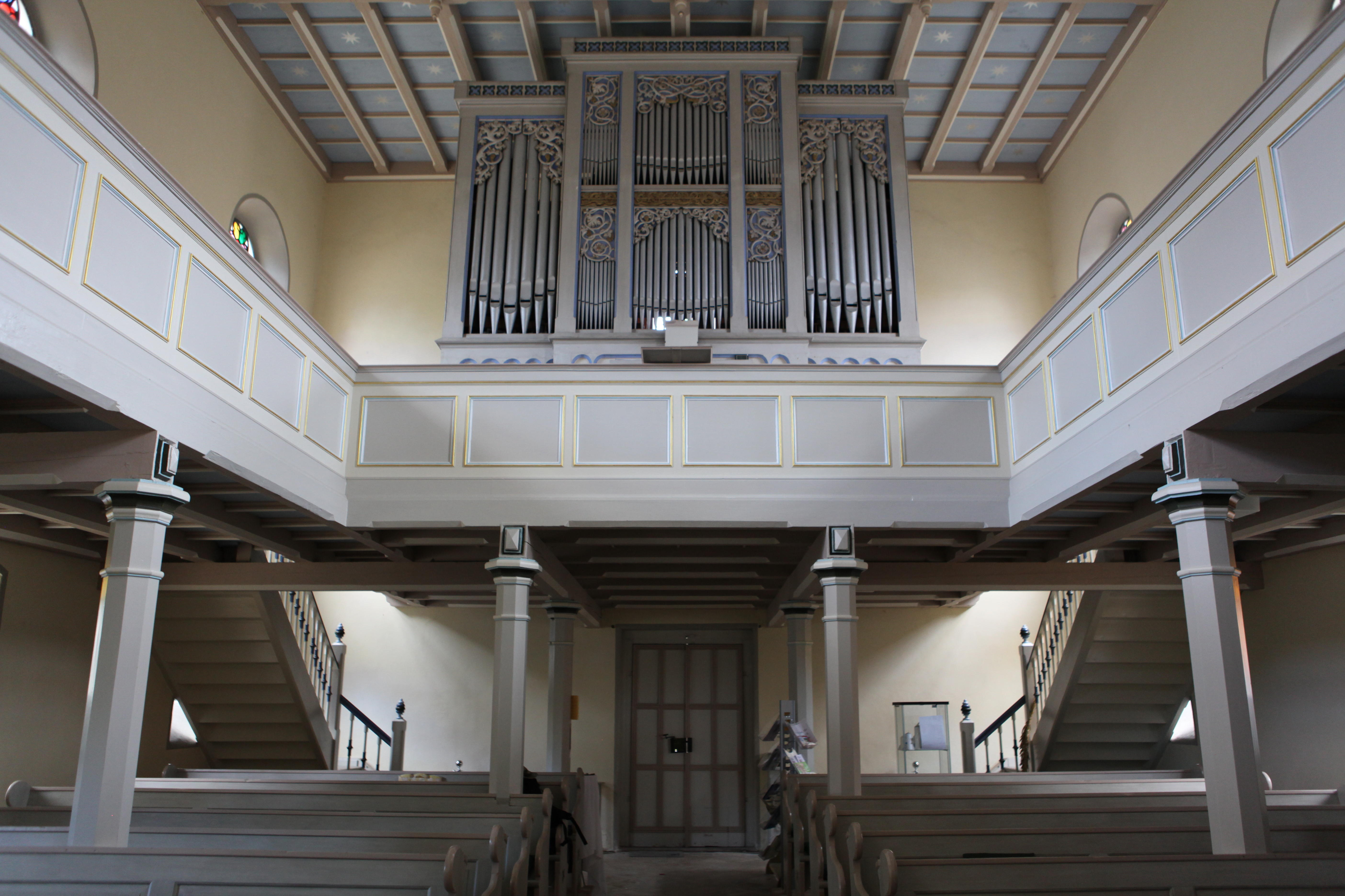 Evangelisch-lutherisch Kirche St. Wigbert in Häselrieth, OT von Hildburghausen